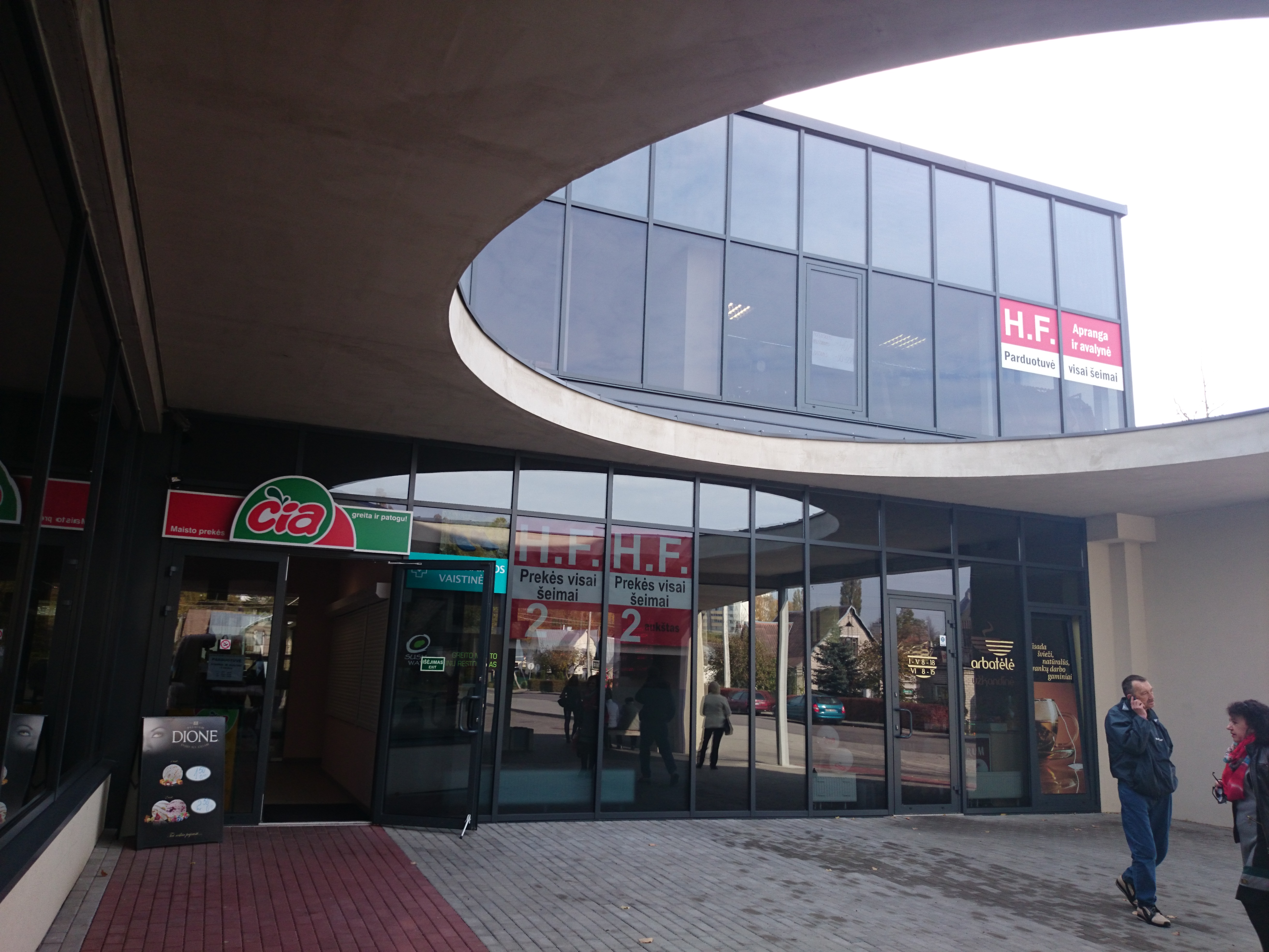 Jonava bus station